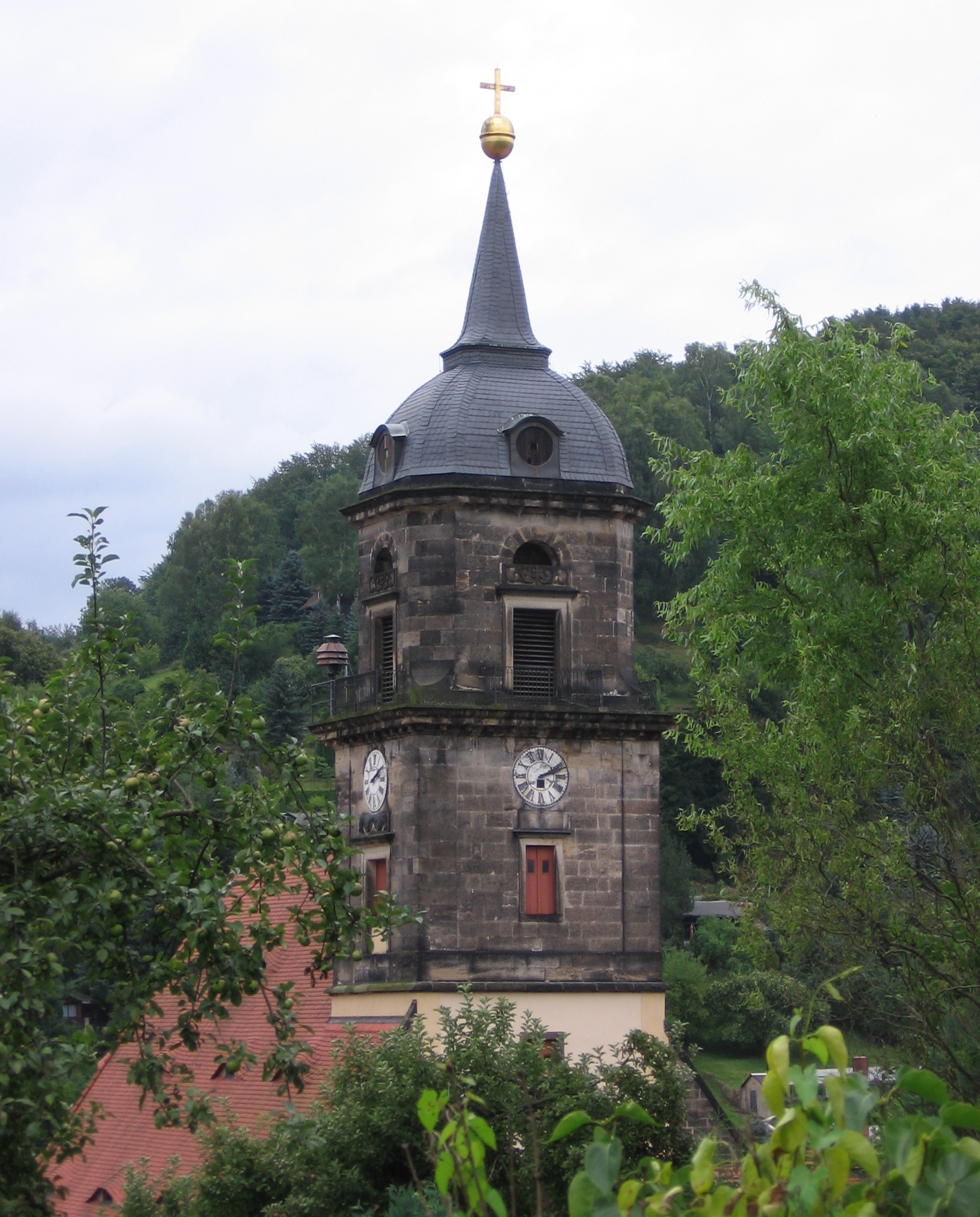 Stadtkirche St. Marien Königstein (Sächsische Schweiz)